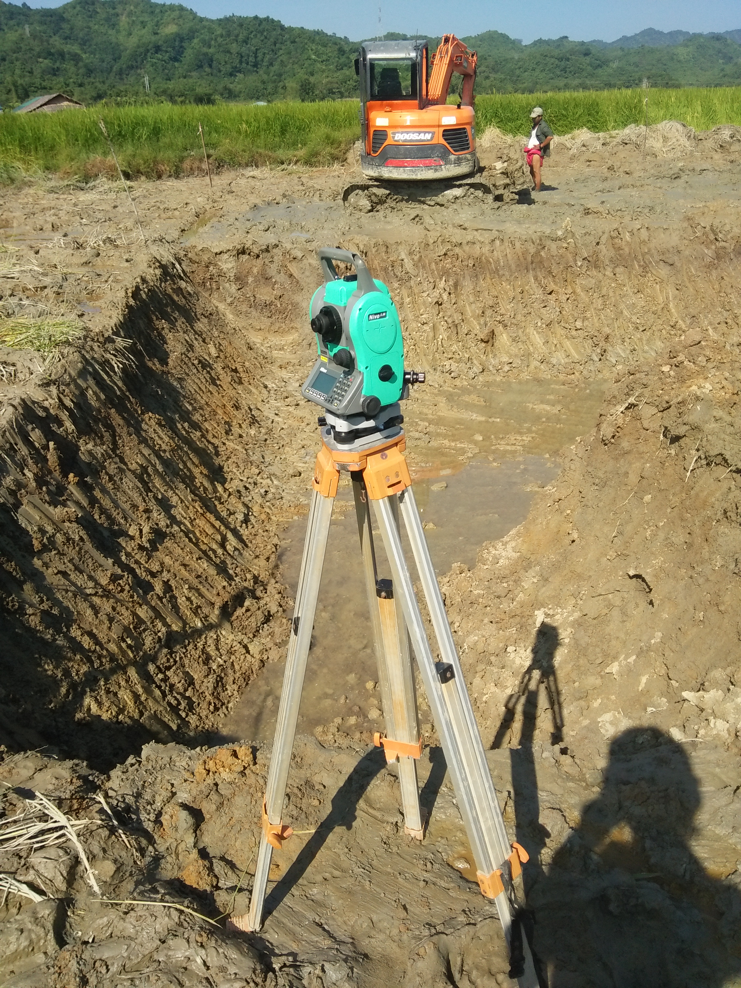 မြန်မာဘာသာ: လုပ်ငန်းခွင်တစ်ခု၌ သီအိုဒိုလိုက်(Total Station) ပြင်ဆင်ထားပုံ